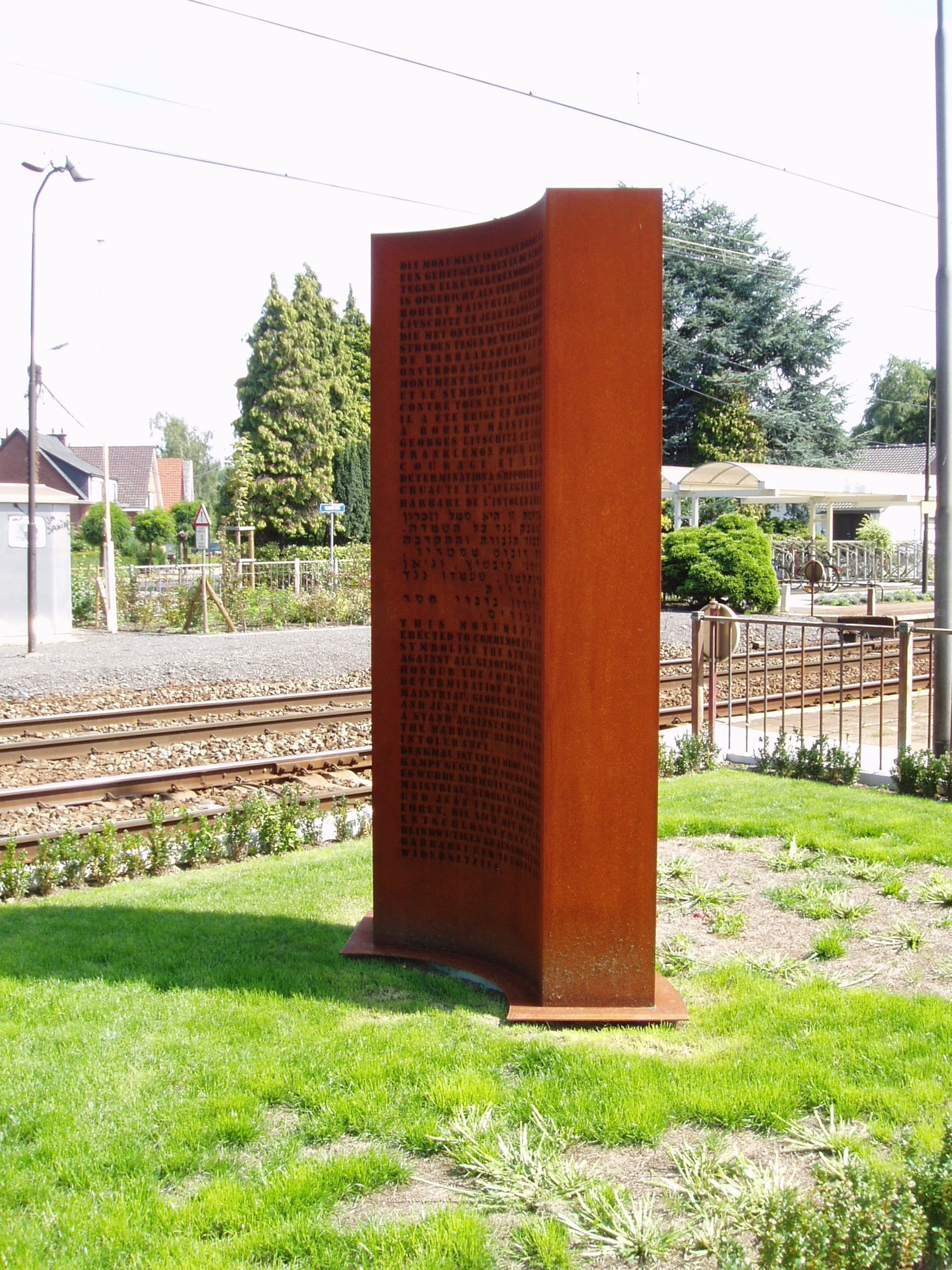 Standbeeld ter nagedachtenis van de verzetsactie tegen het 20e jodentransport.